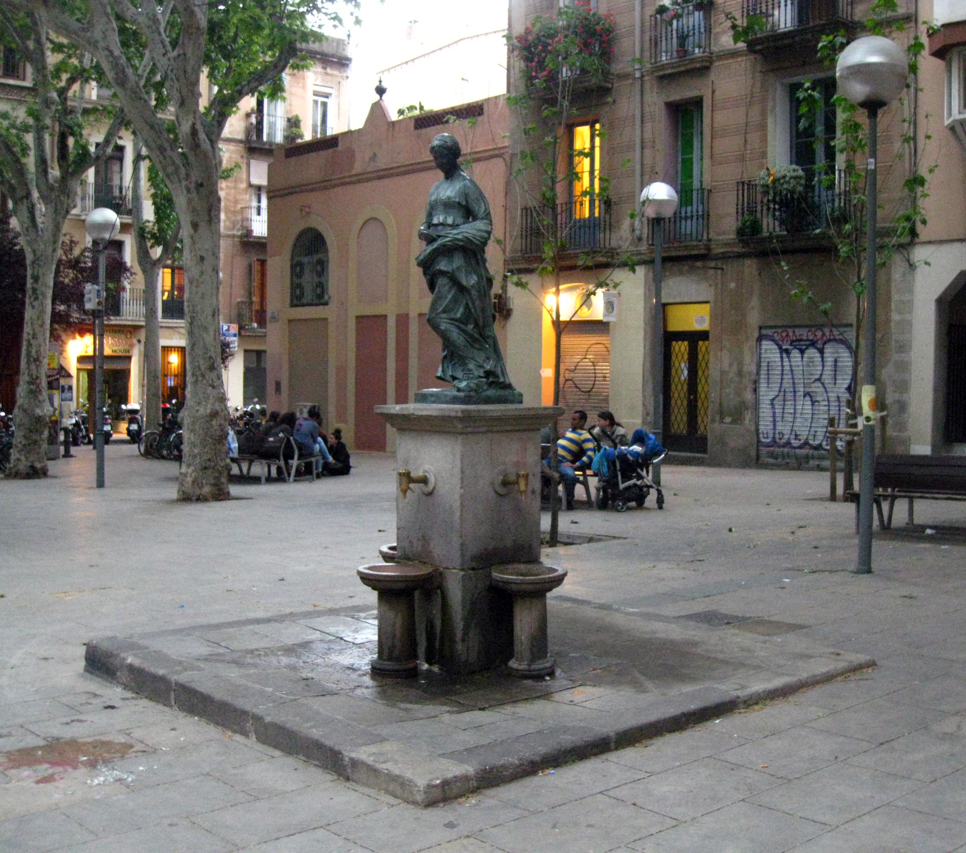 Font de Rut (Josep Maria Camps i Arnau). Pl. de la Virreina (Barcelona)